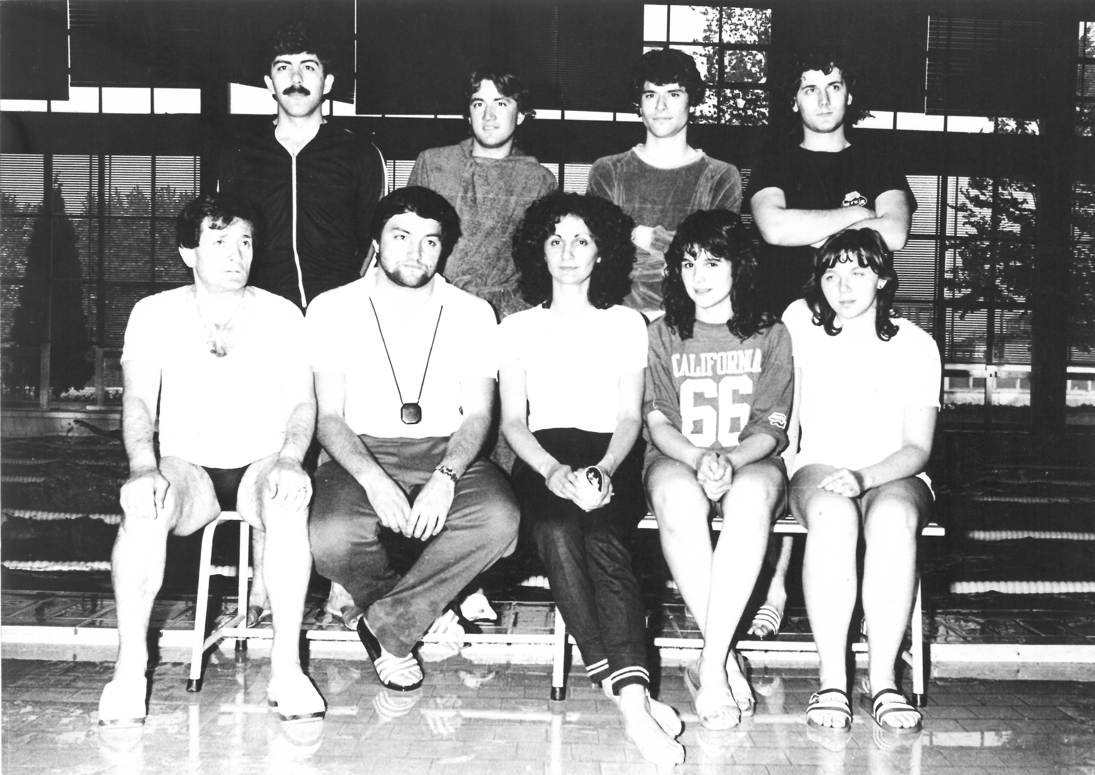 Gli allenatori della A.S. Reggiana Nuoto 1947 (anni '80).